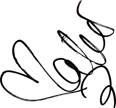 Autografo de Malú.